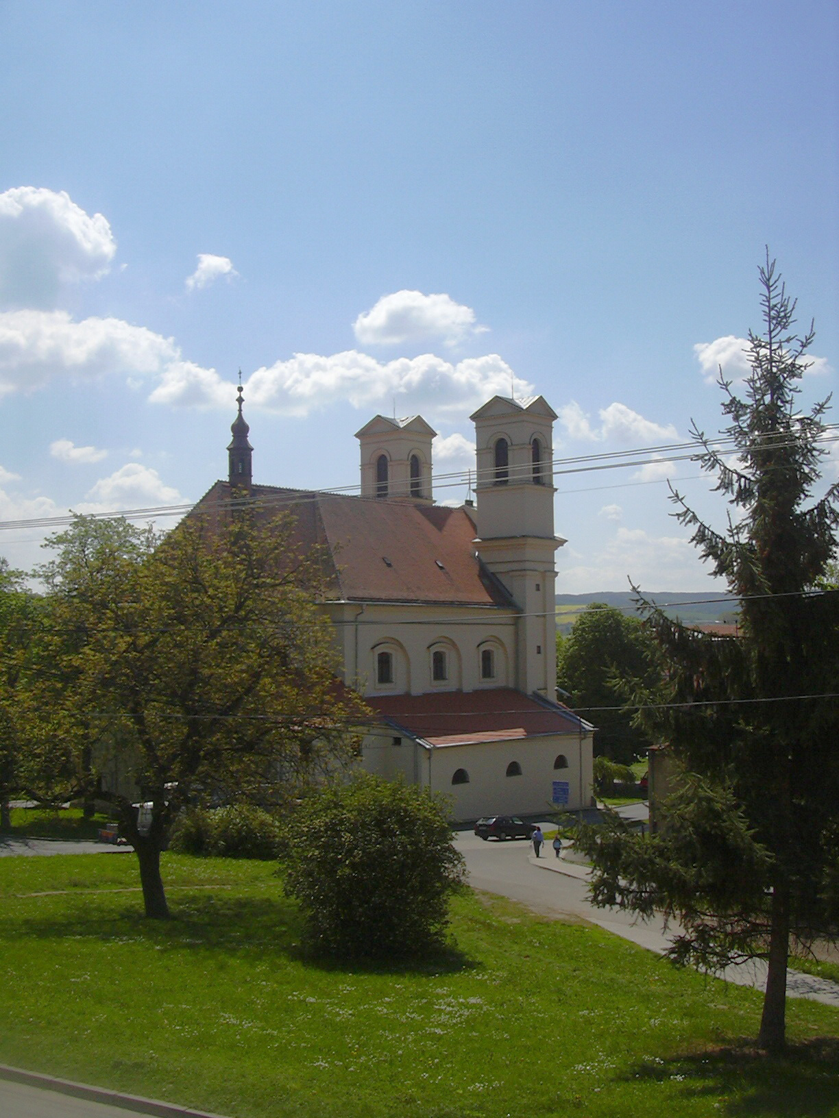 Kostel Nanebevzetí Panny Marie Bučovice (Vyškov- Czech republic)